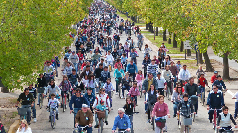 Evento que se lleva a cabo en el marco de la Fiesta Provincial del Citrus en la ciudad de Malabrigo, Santa Fe, Argentina.